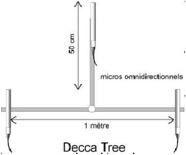 dibujo de la colocacion de los toma microfonica decca tree